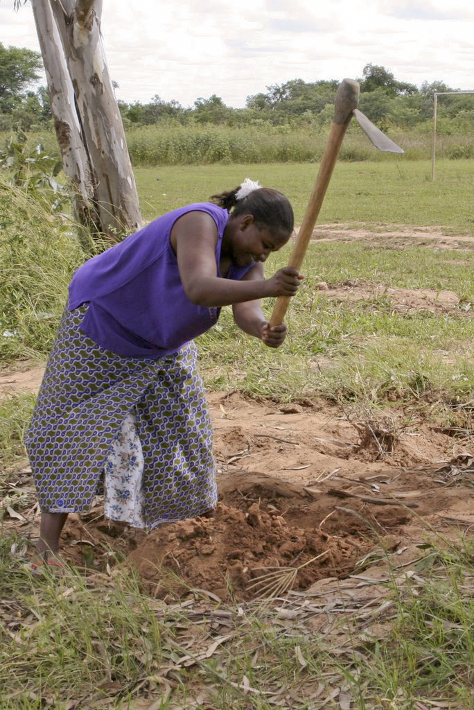 subsisting farming in Zambia